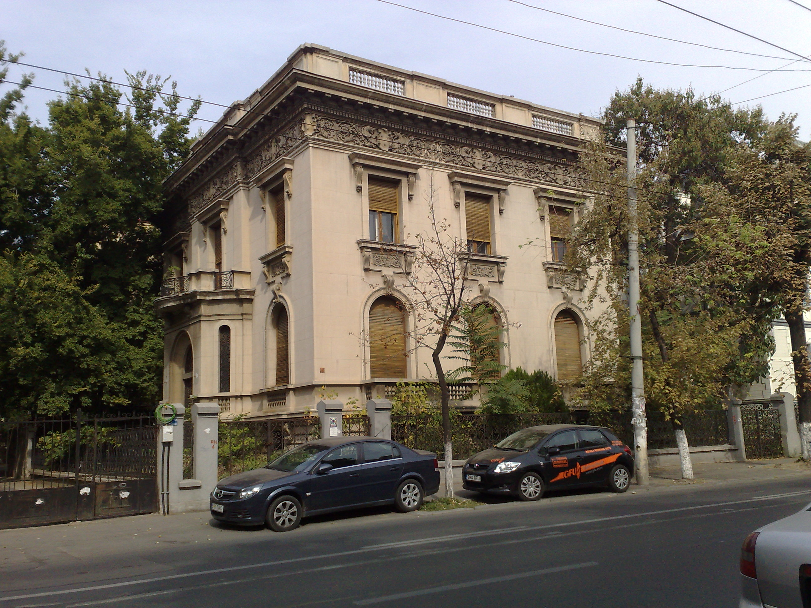 Casa, Bd. Dacia nr. 75, București